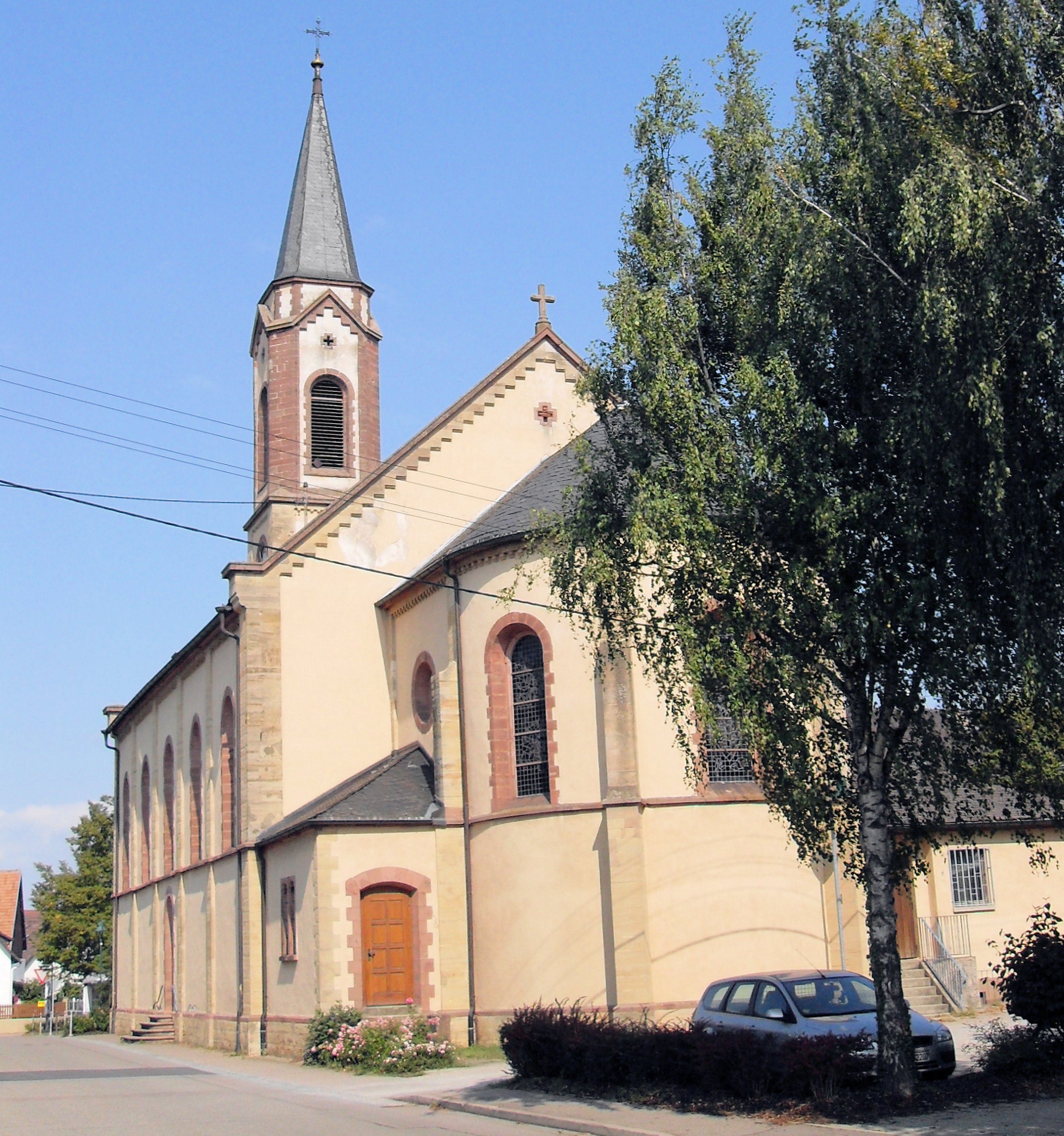 St. Peter und Paul in Hartheim am Rhein